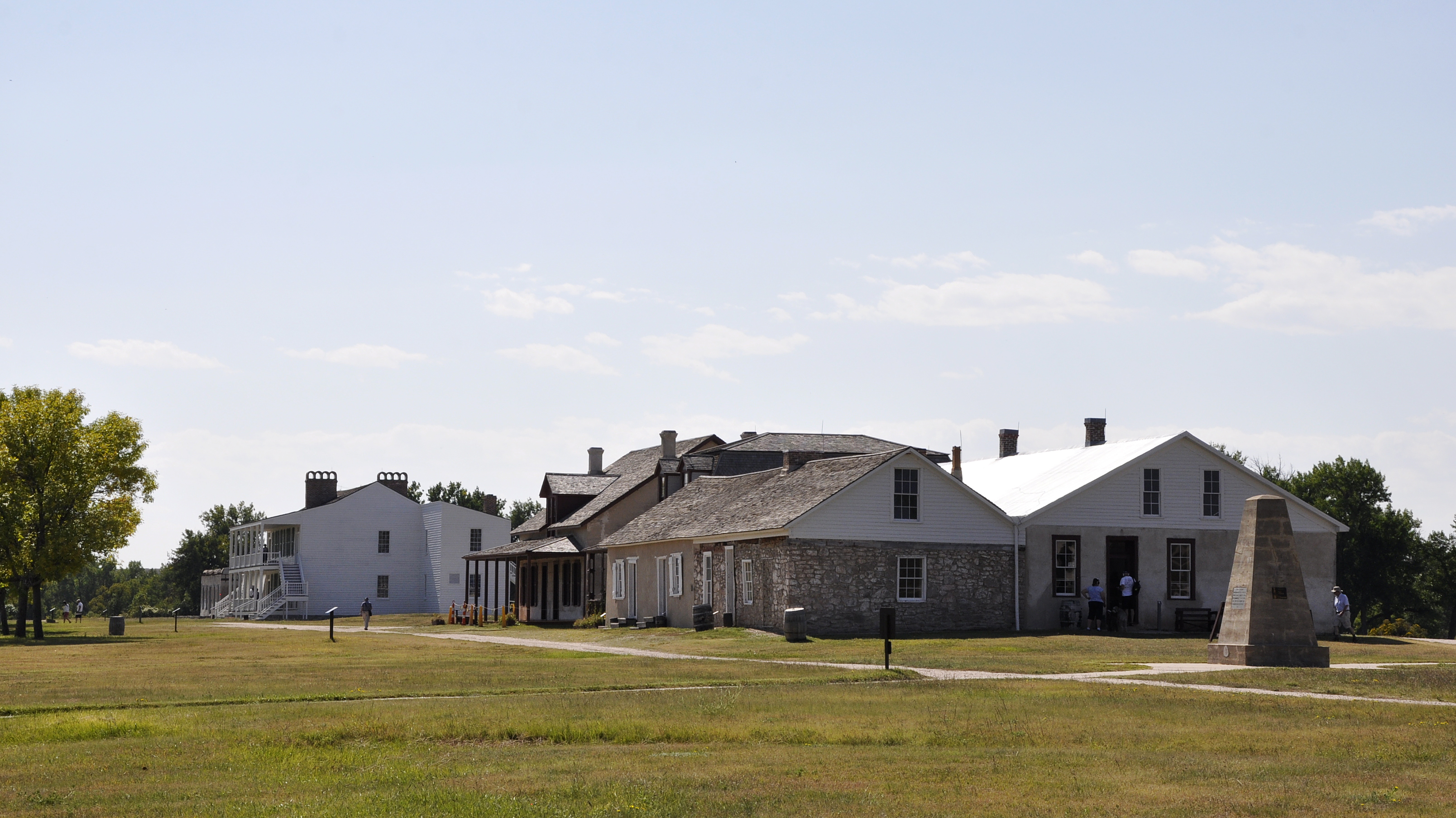 Fort Laramie ten zuiden van de plaats Fort Laramie, in Wyoming, USA